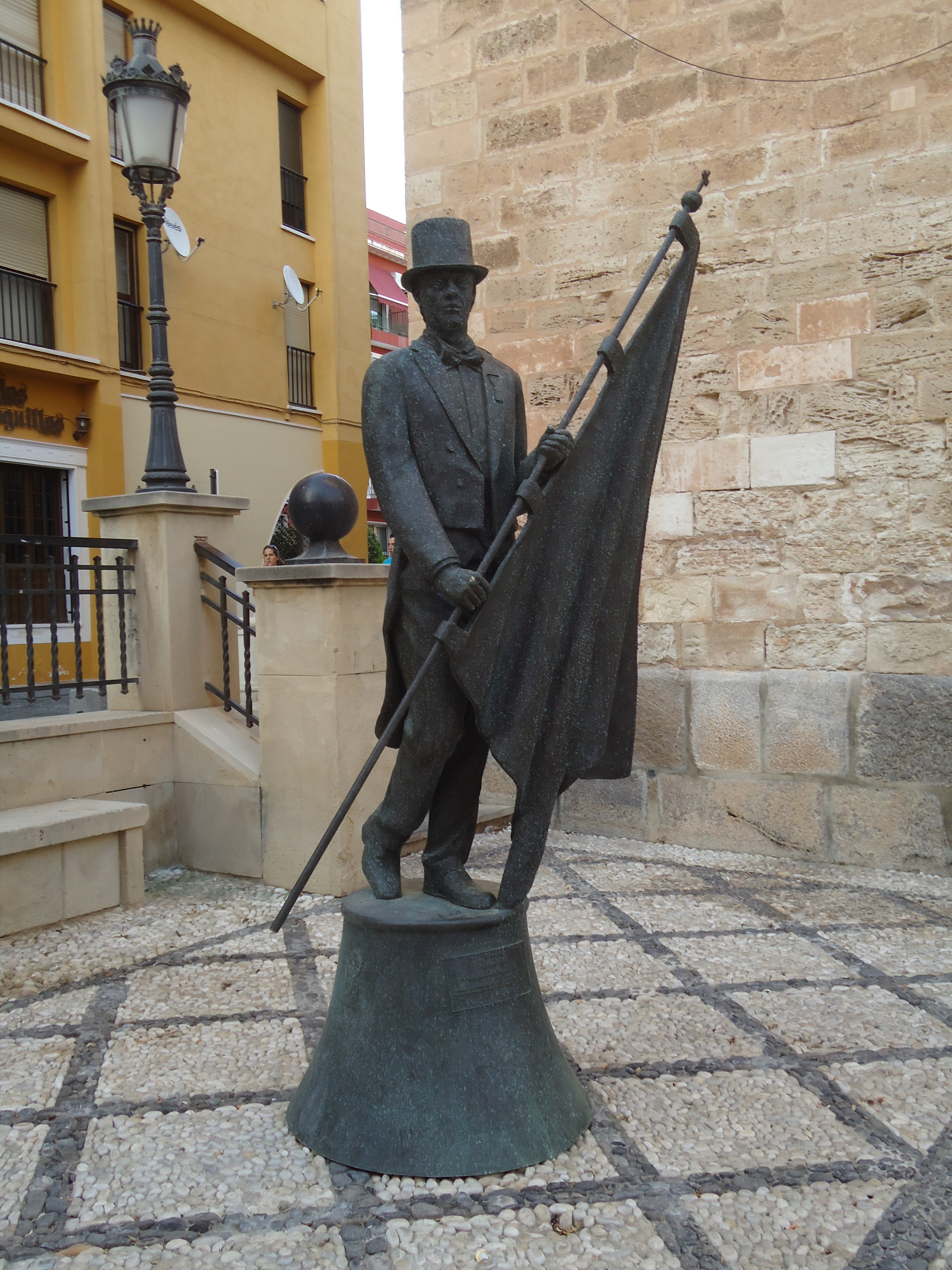 Estatua en honor al caballero cubierto, figura de especial tradición de la Semana Santa de Orihuela (Comunidad Valenciana, España)